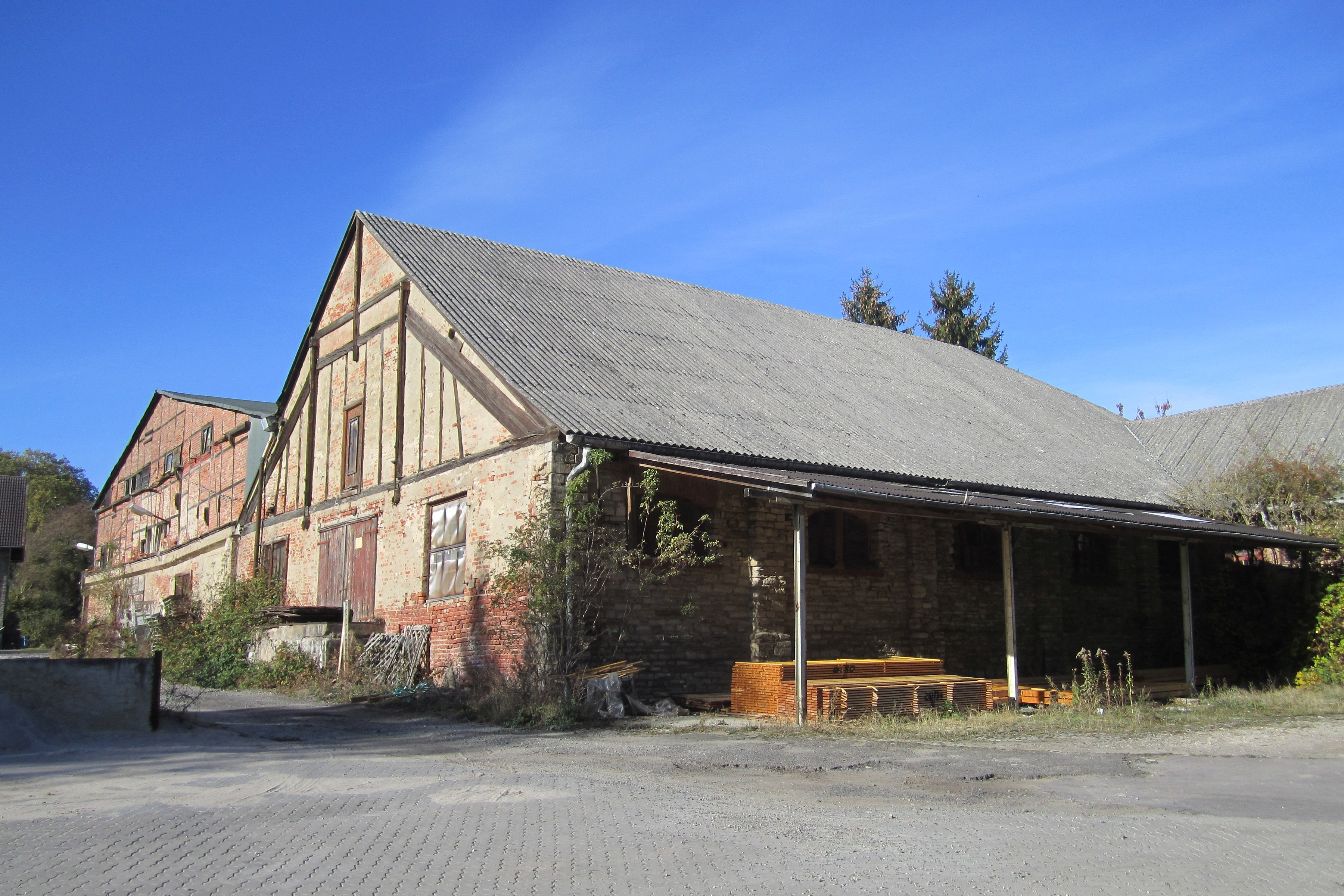 Gebäude der Saline Carlshall in Schöningen, Niedersachsen, Deutschland.